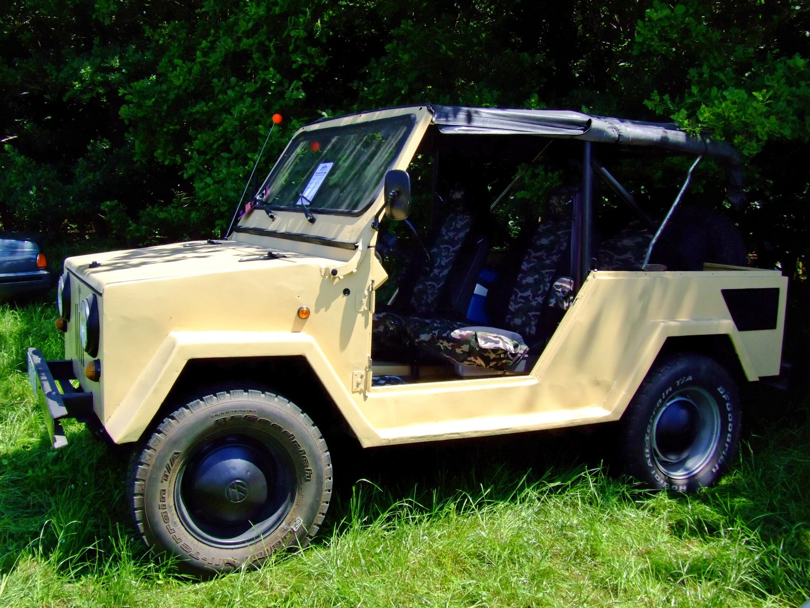 Quelle: selbst fotografiert, 06/2007 Fotograf: Späth Chr.